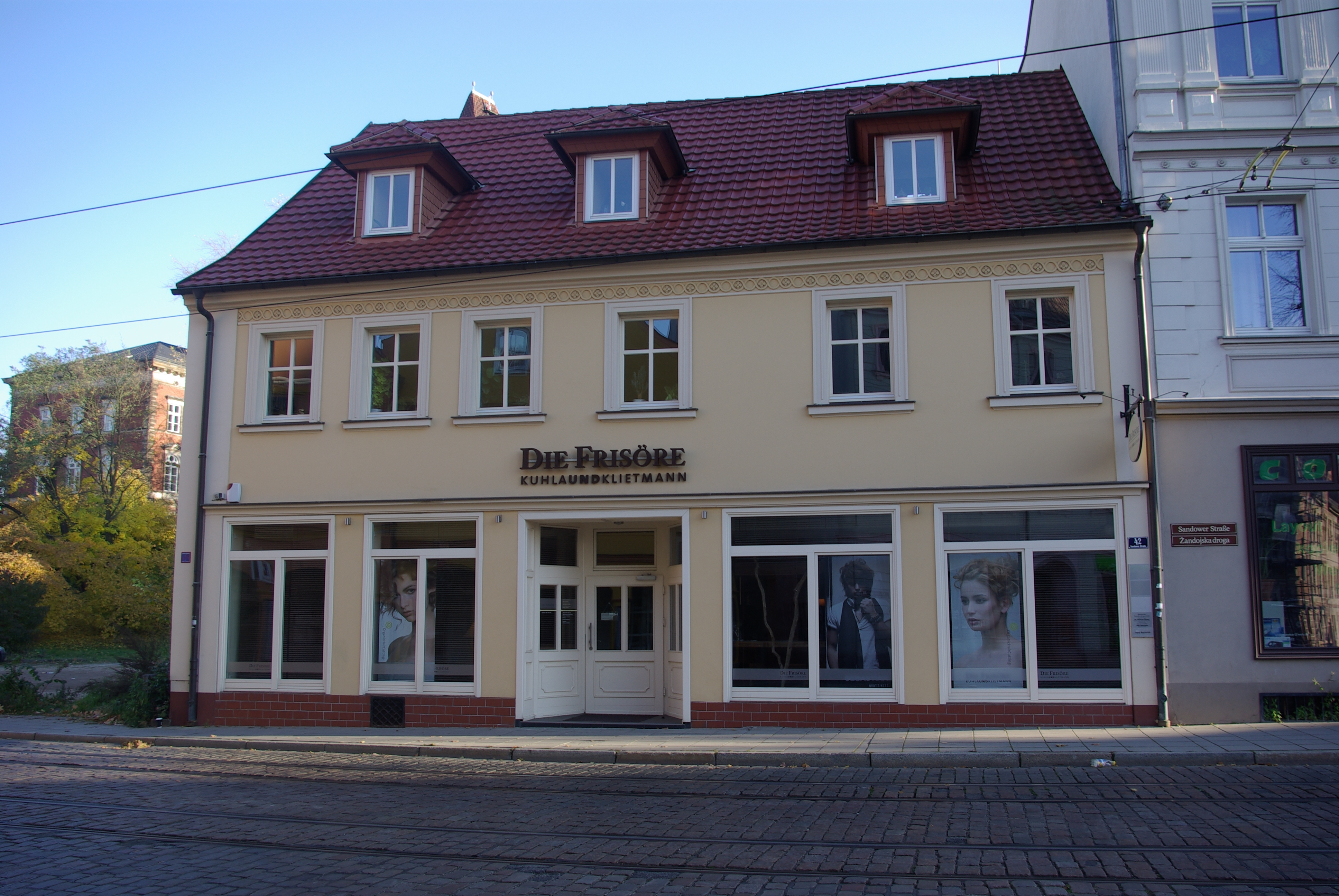 Cottbus in Brandenburg. Das haus in der Sandower Straße 42 steht unter Denkmalschutz.